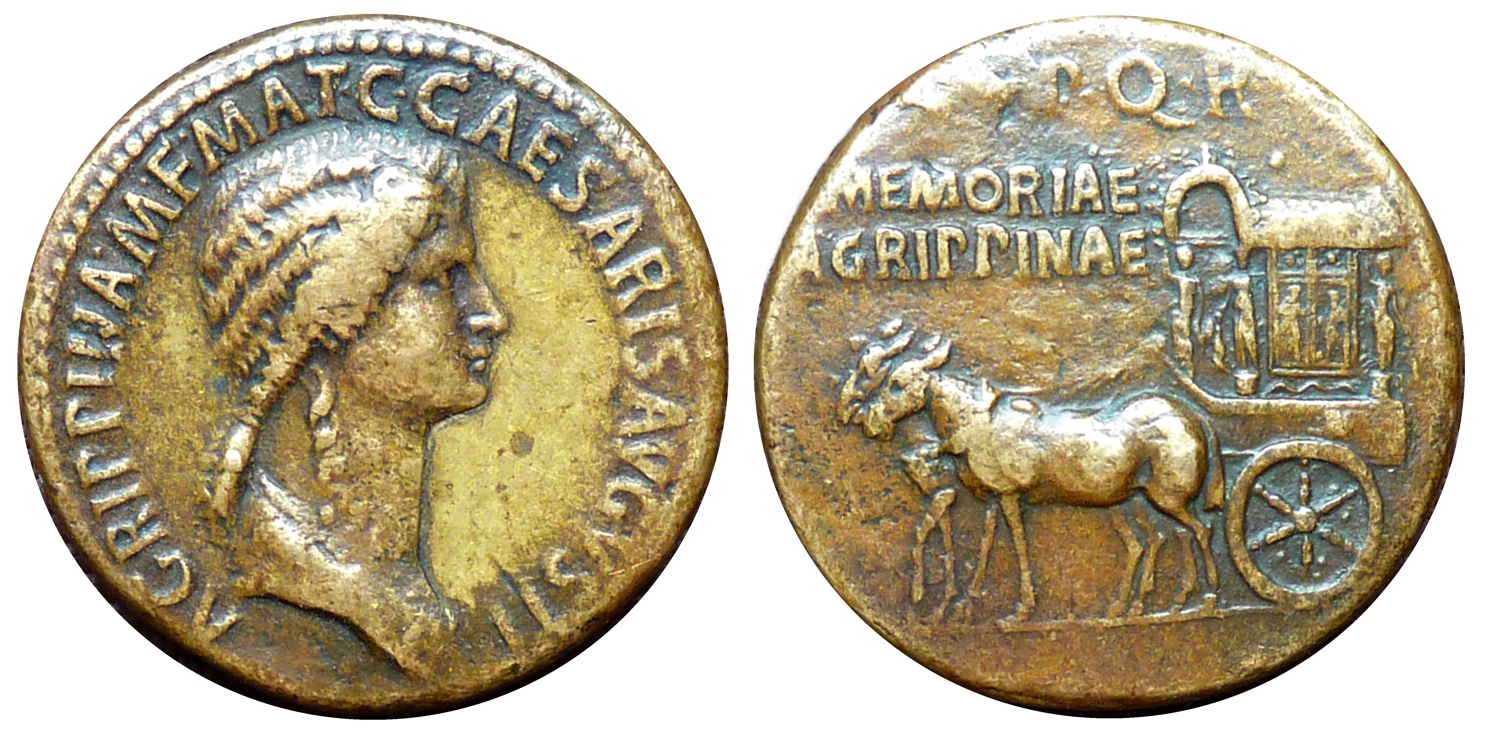 Sesterce commémorative d'Agripine l'Ainée (14 av.JC - 33 ap.JC) frappée par Caligula vers 37. Revers : chariot dit carpentum tiré par deux mules. Légende : MEMORIAE AGRIPPINAE - poids 29 gr diamètre 33 mm.